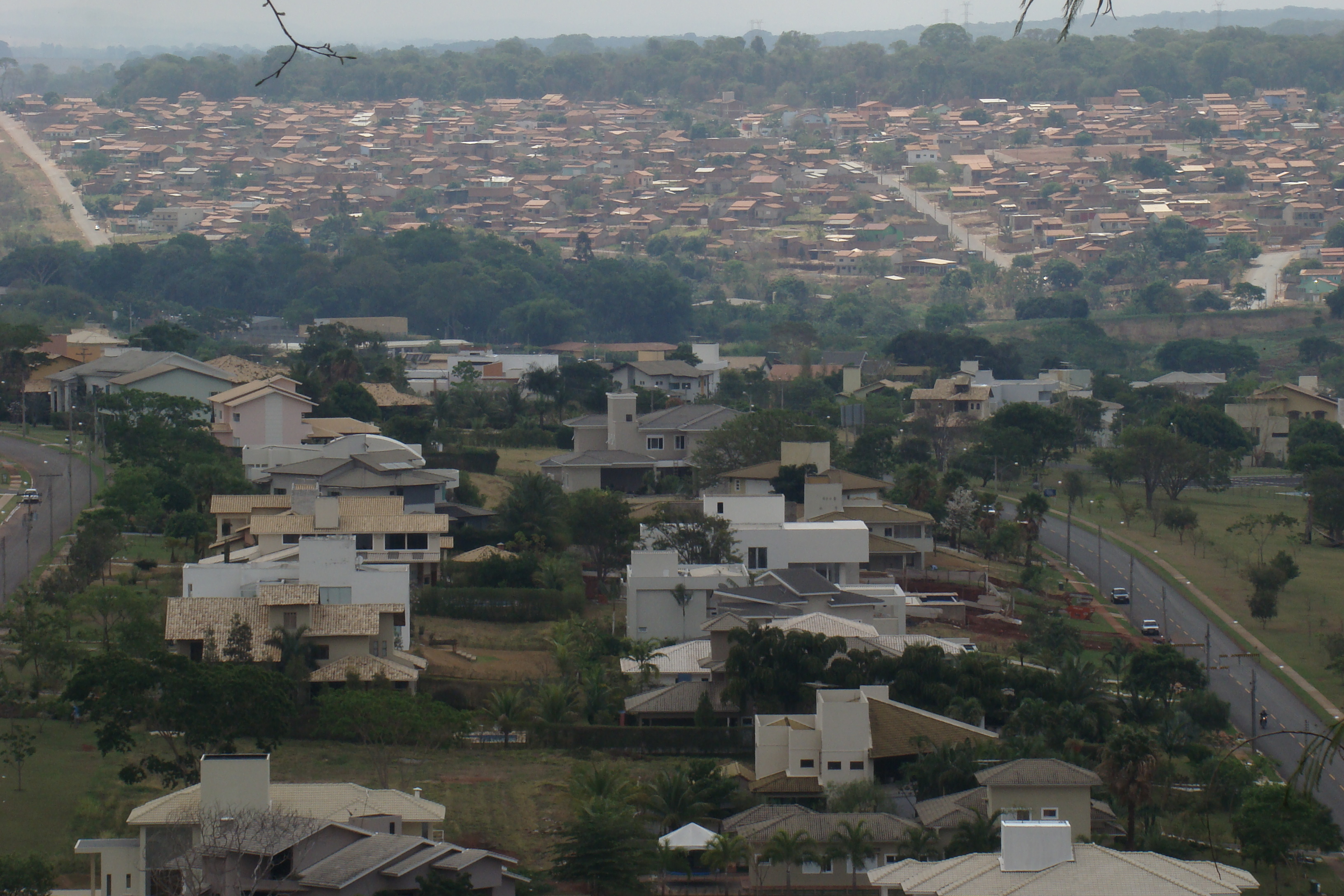 Vista de residências no condomínio Aldeia do Vale e o contraste do Vale dos Sonhos ao fundo